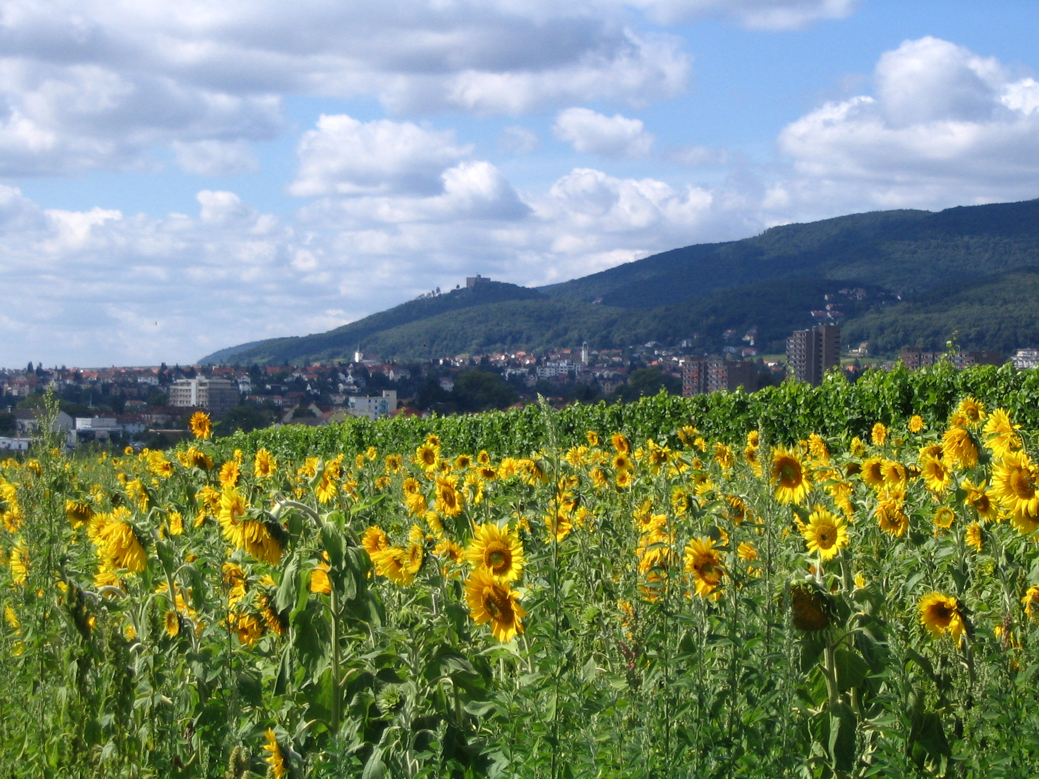 Blick auf Neustadt und Hambacher Schloss, Sonnenblumenfeld im Vordergrund